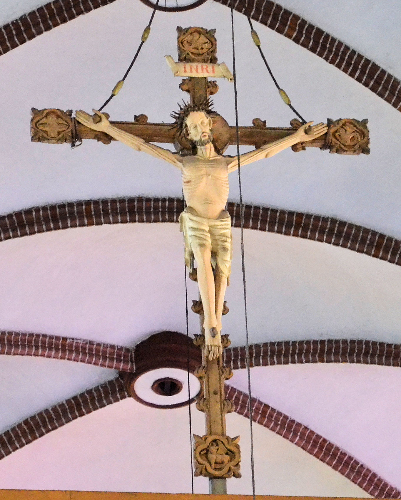 Krucyfiks na belce tęczowej w katedrze w Kołobrzegu